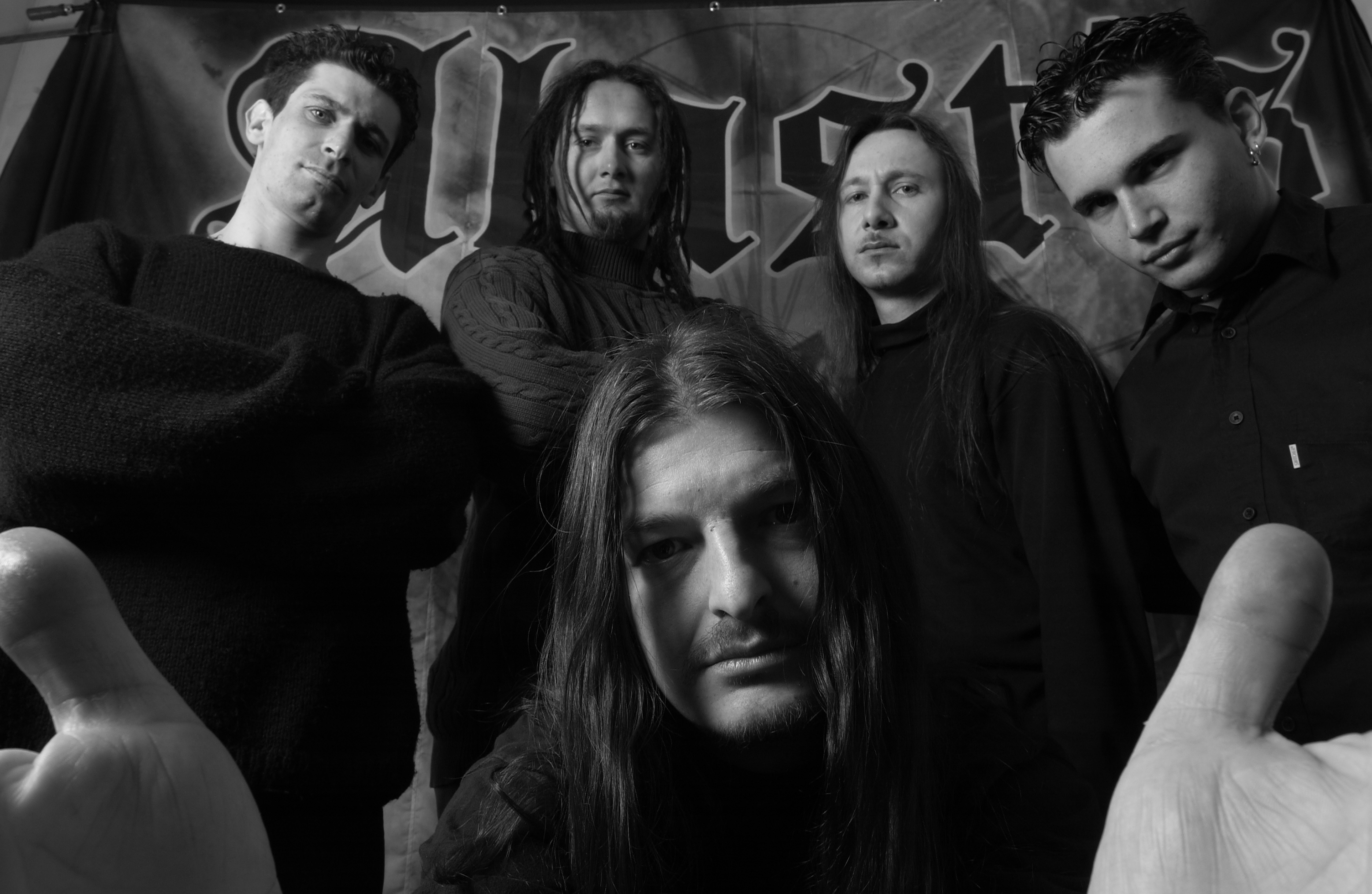 dernière session photo du groupe pour la promotion de l'album"Unity"